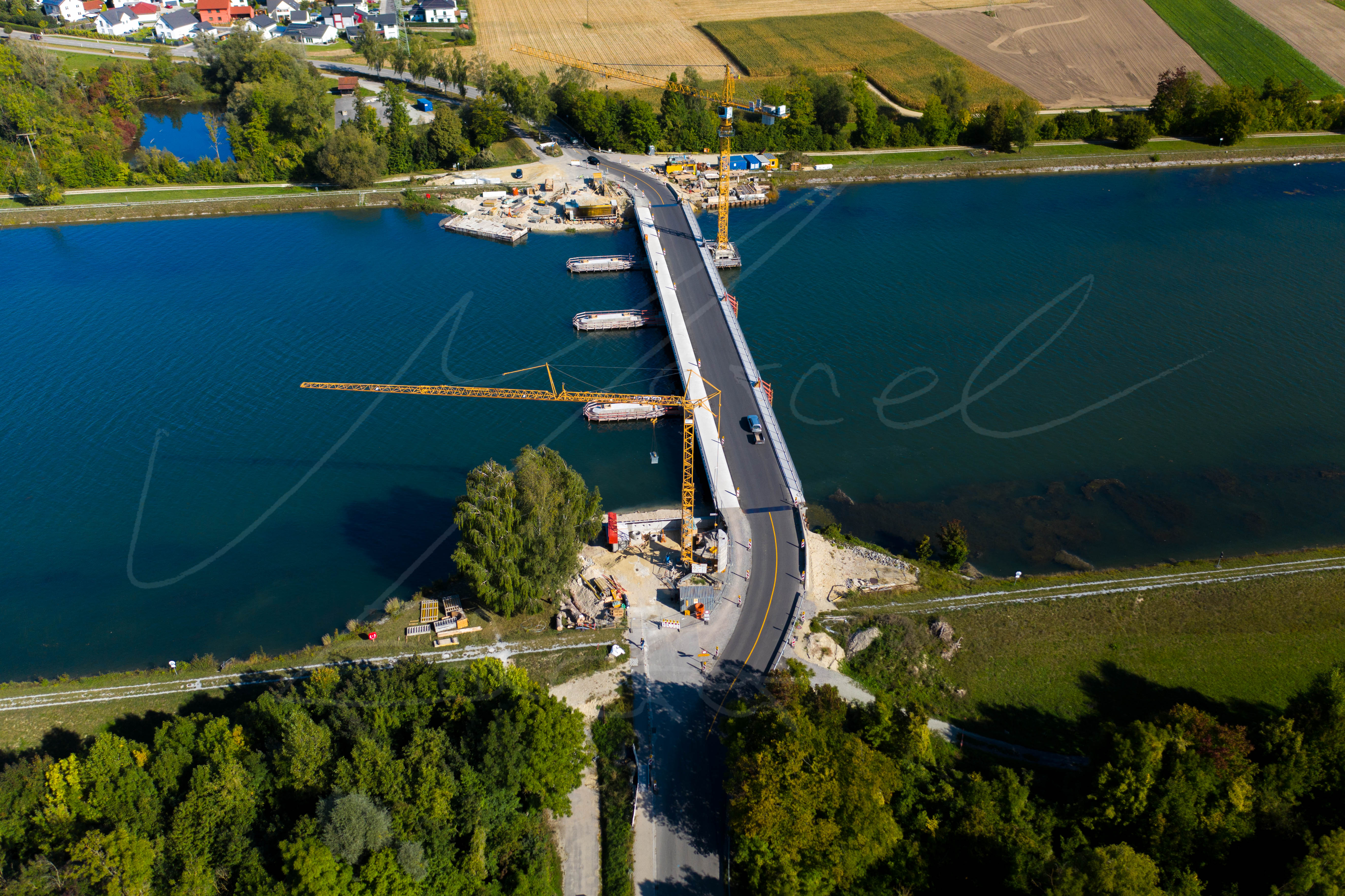 Die neue Isarbrücke welche am von 4.2.18-4.12.19 gebaut wurde.